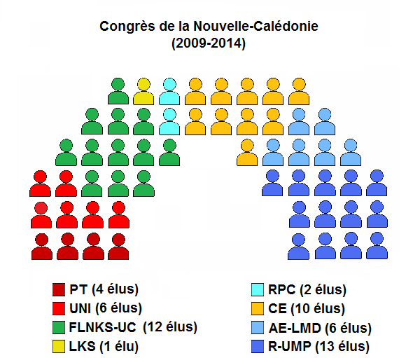 Congrès de la Nouvelle-Calédonie après les élections de 2009 (10 mai et 6 décembre).